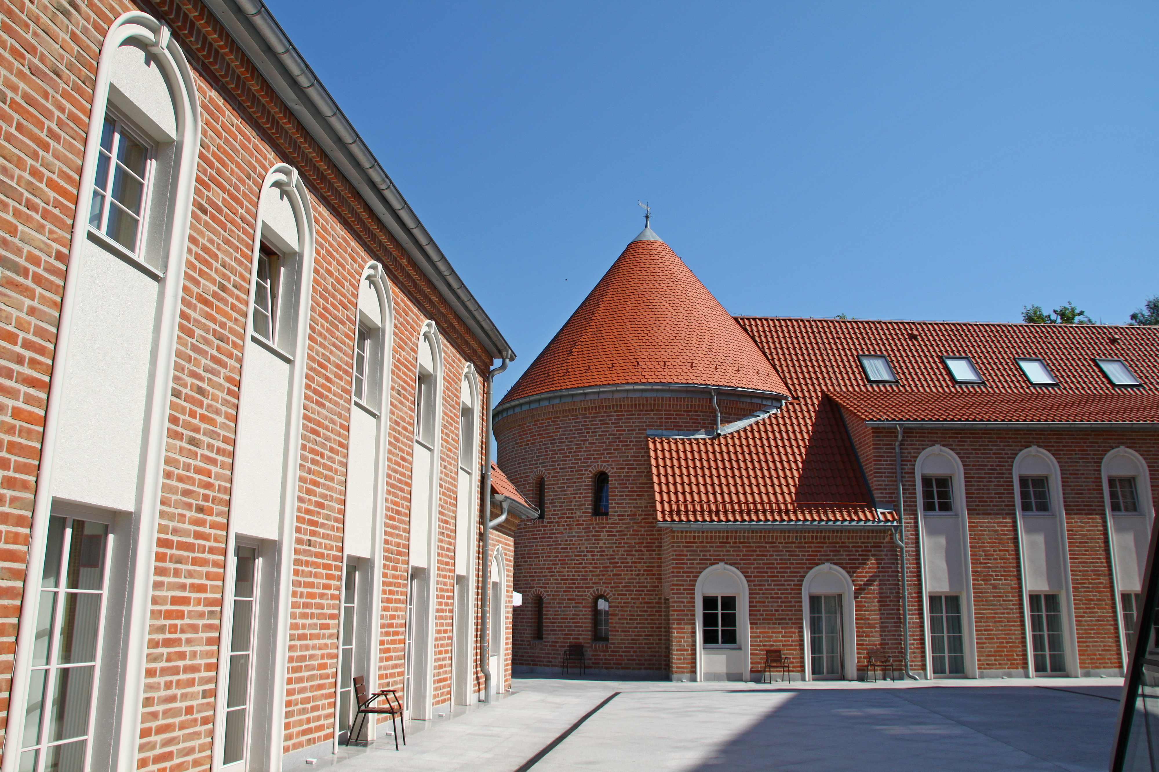 Giżycko, zamek, XIV - 2 poł. XIX